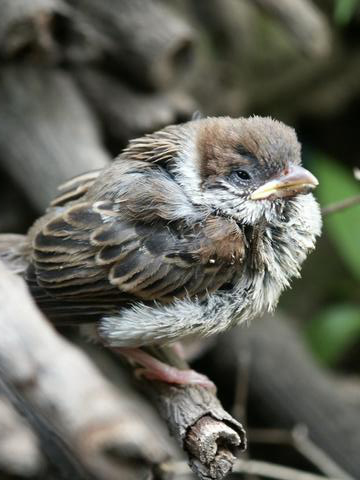 生まれたばかりのスズメ